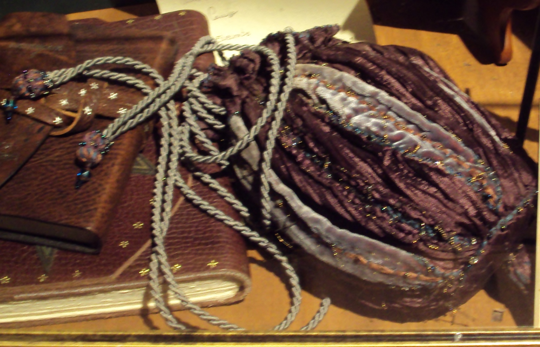 Hermelien Griffels kralen handtas (Engels: Hermione Granger's beaded handbag) tijdens Harry Potter: The Exhibition in Brussel (België)